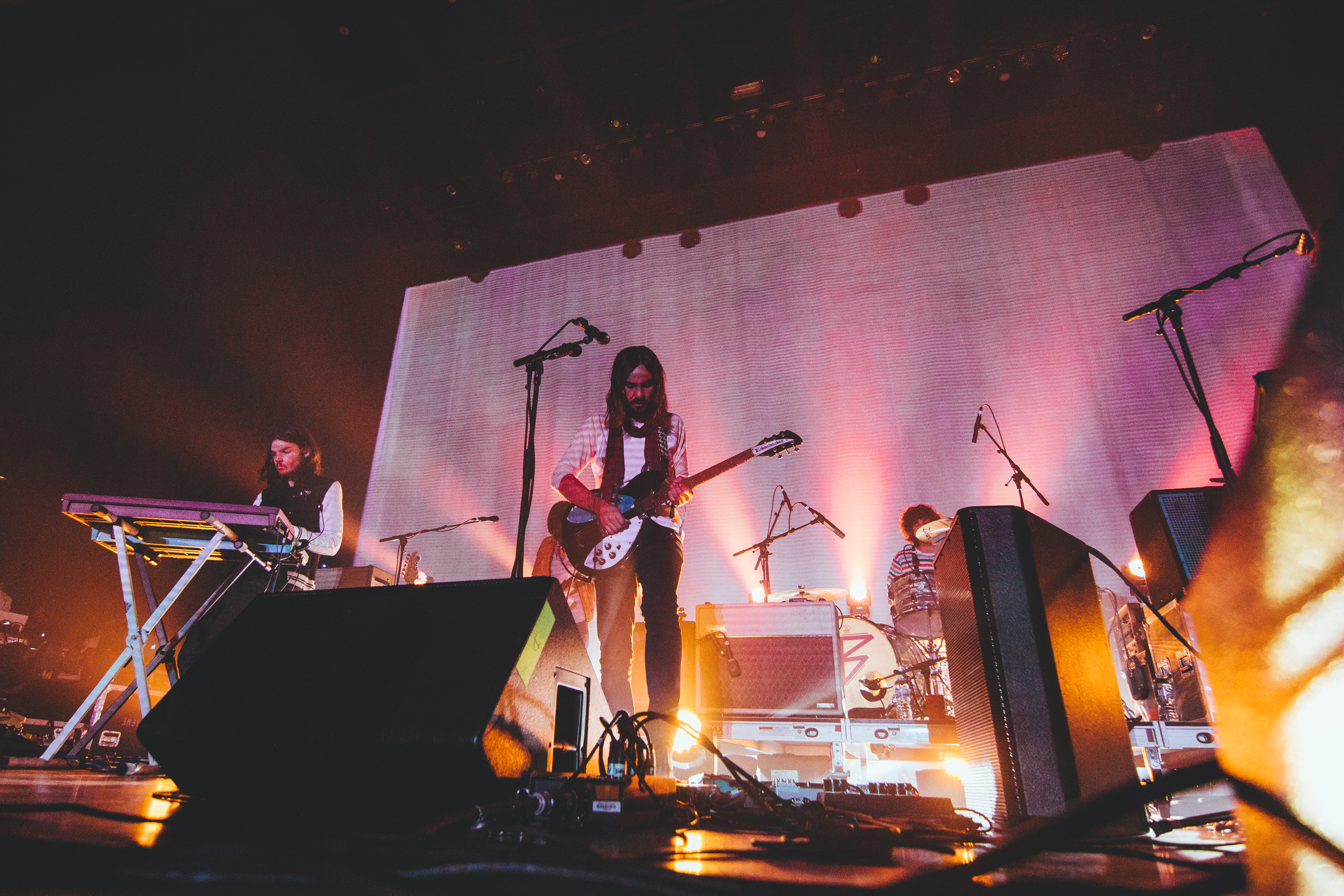 Tame_Impala-3736